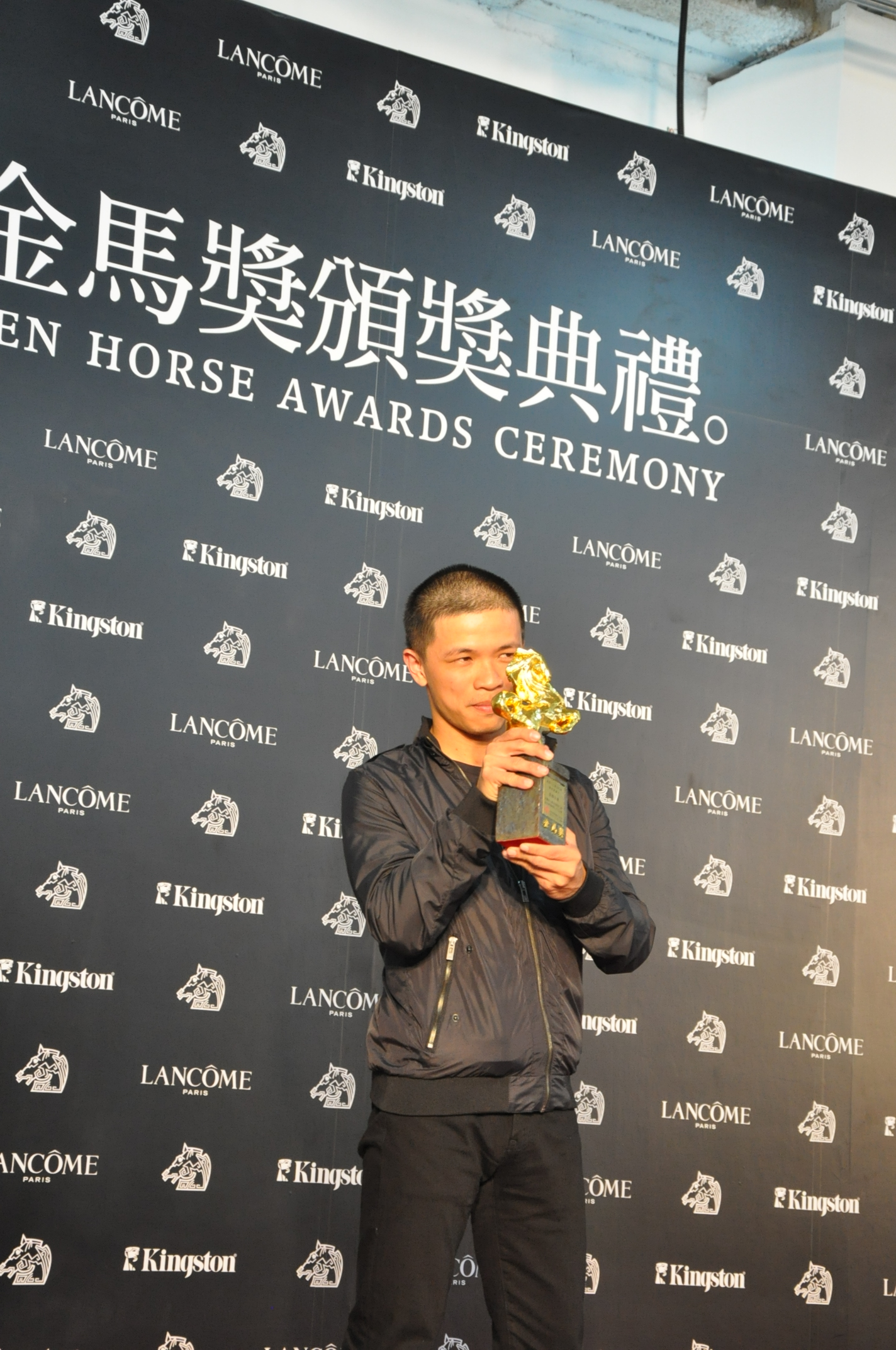 金馬獎 街舞狂潮 蘇哲賢導演